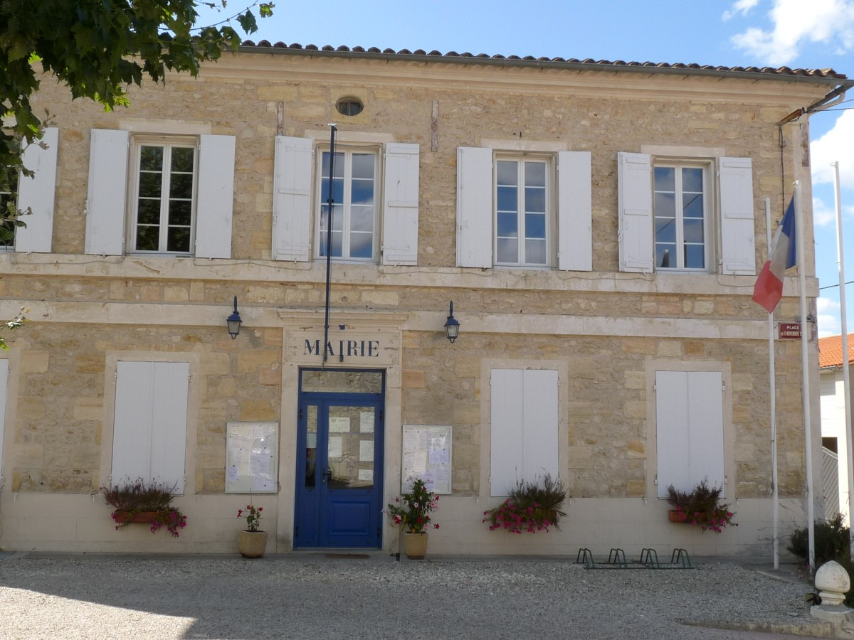 Mairie de St-Seurin-de-Cadourne, Gironde, France